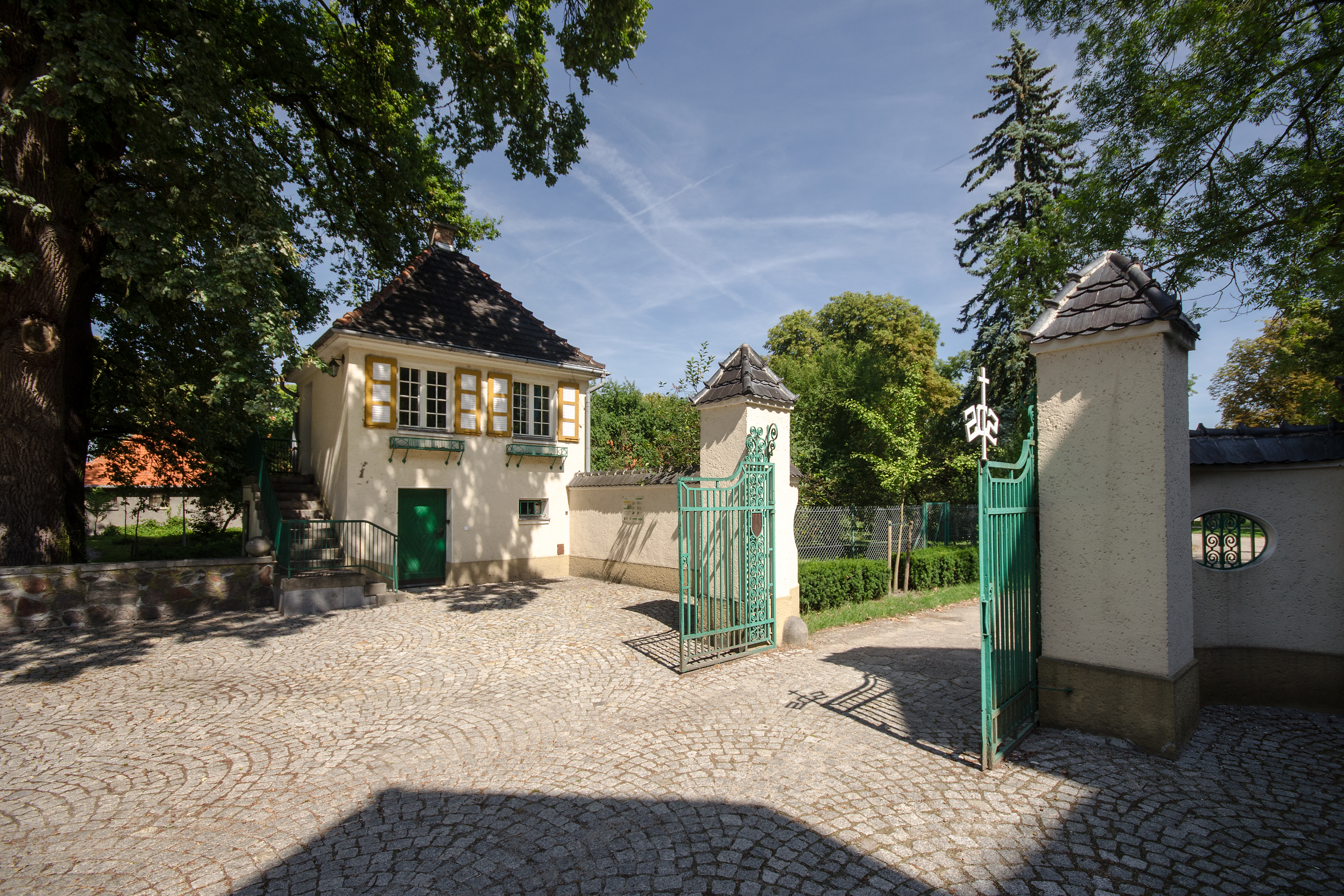 Bagno, stróżówka z bramą, 1913